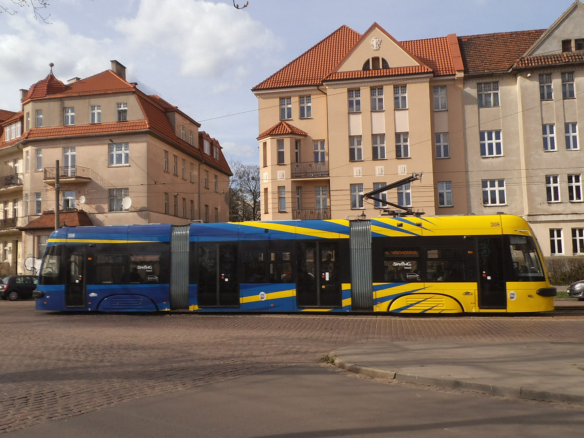 Swing (trójczłonowy)-Toruń